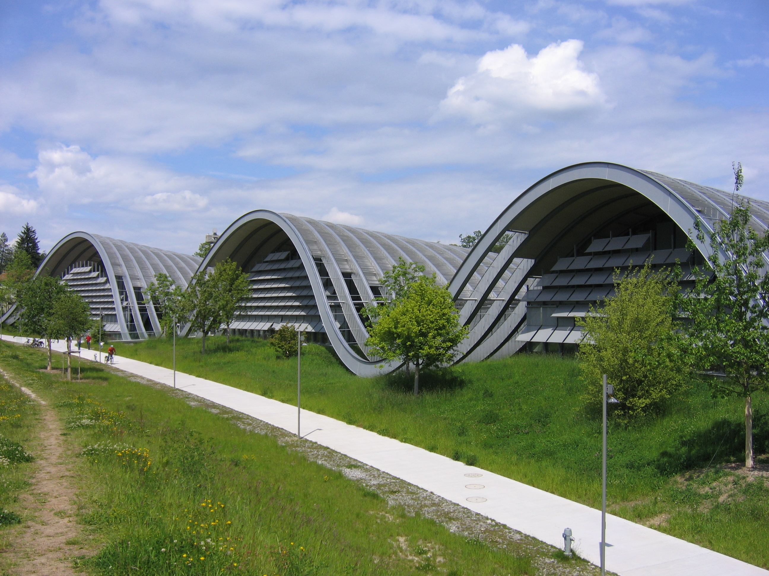 Zentrum Paul Klee, Bern. Architekt: Renzo Piano.